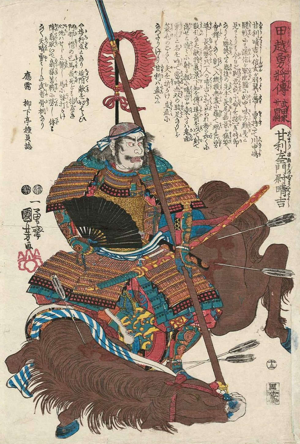 「甲越勇將傳武田家廾四將：甘利左門尉晴吉」